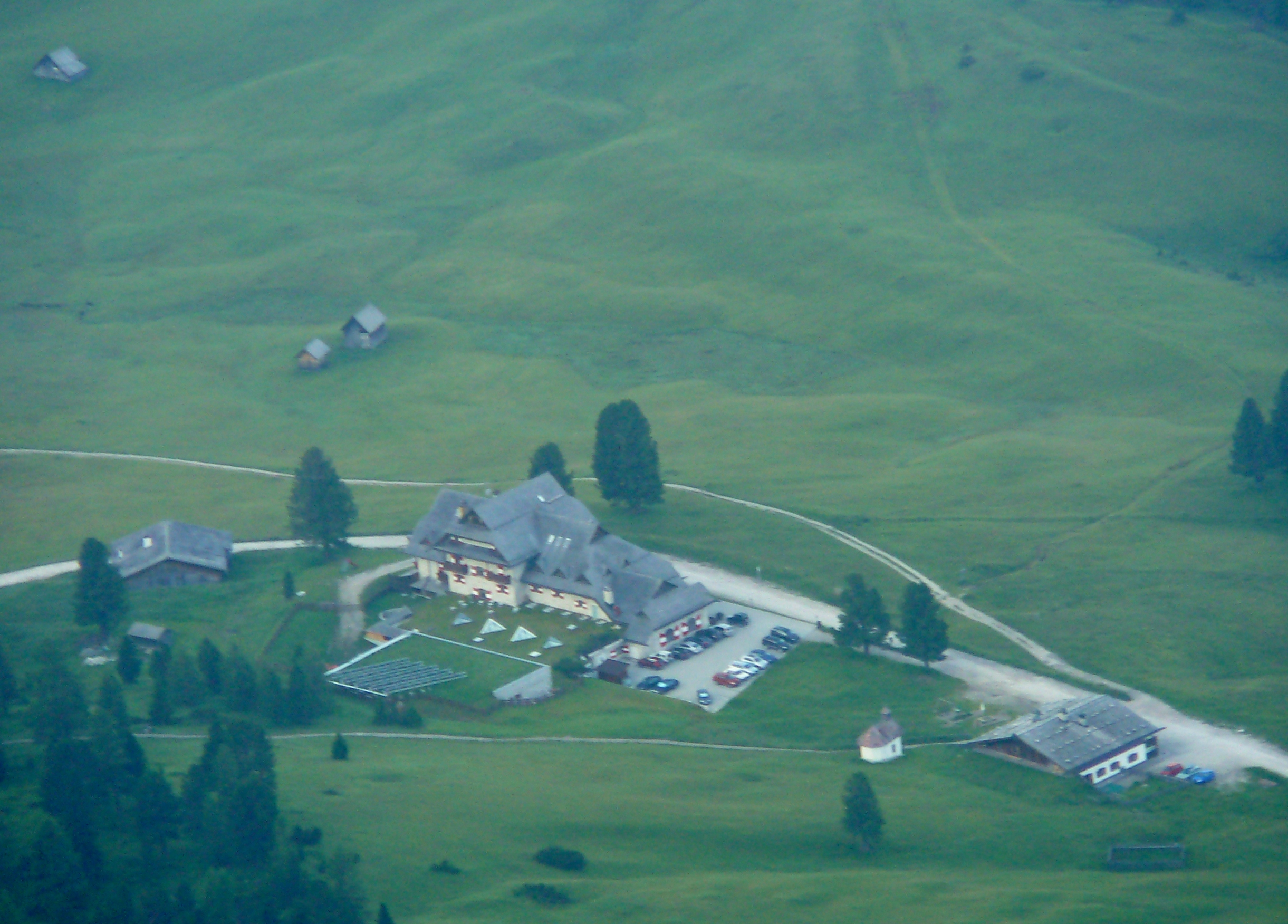 Picco di Vallandro - Inizio sentiero n 40